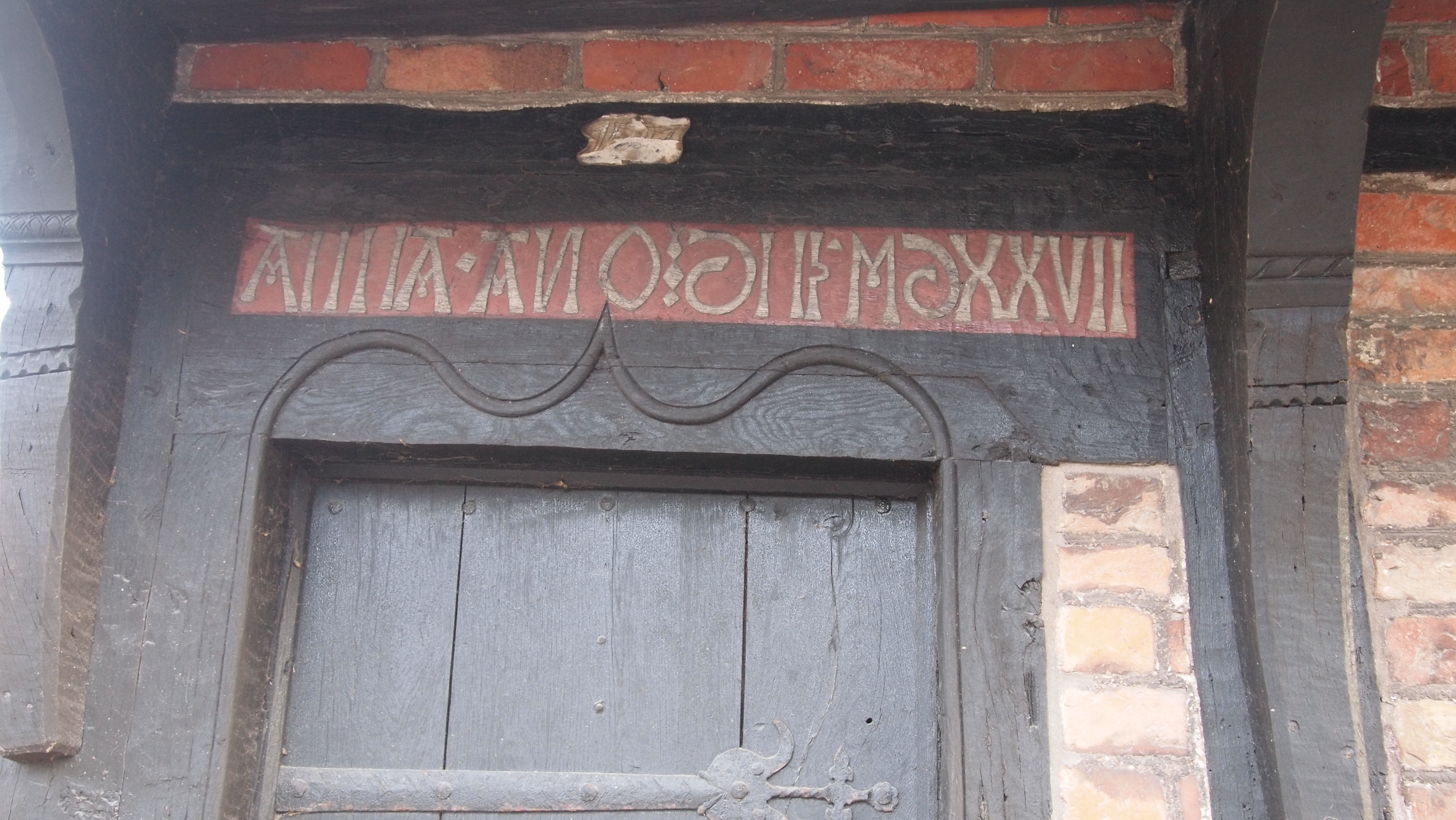 Dateringen over døren med teksten "ANNA ANO DNI MDXXVII" (1527)